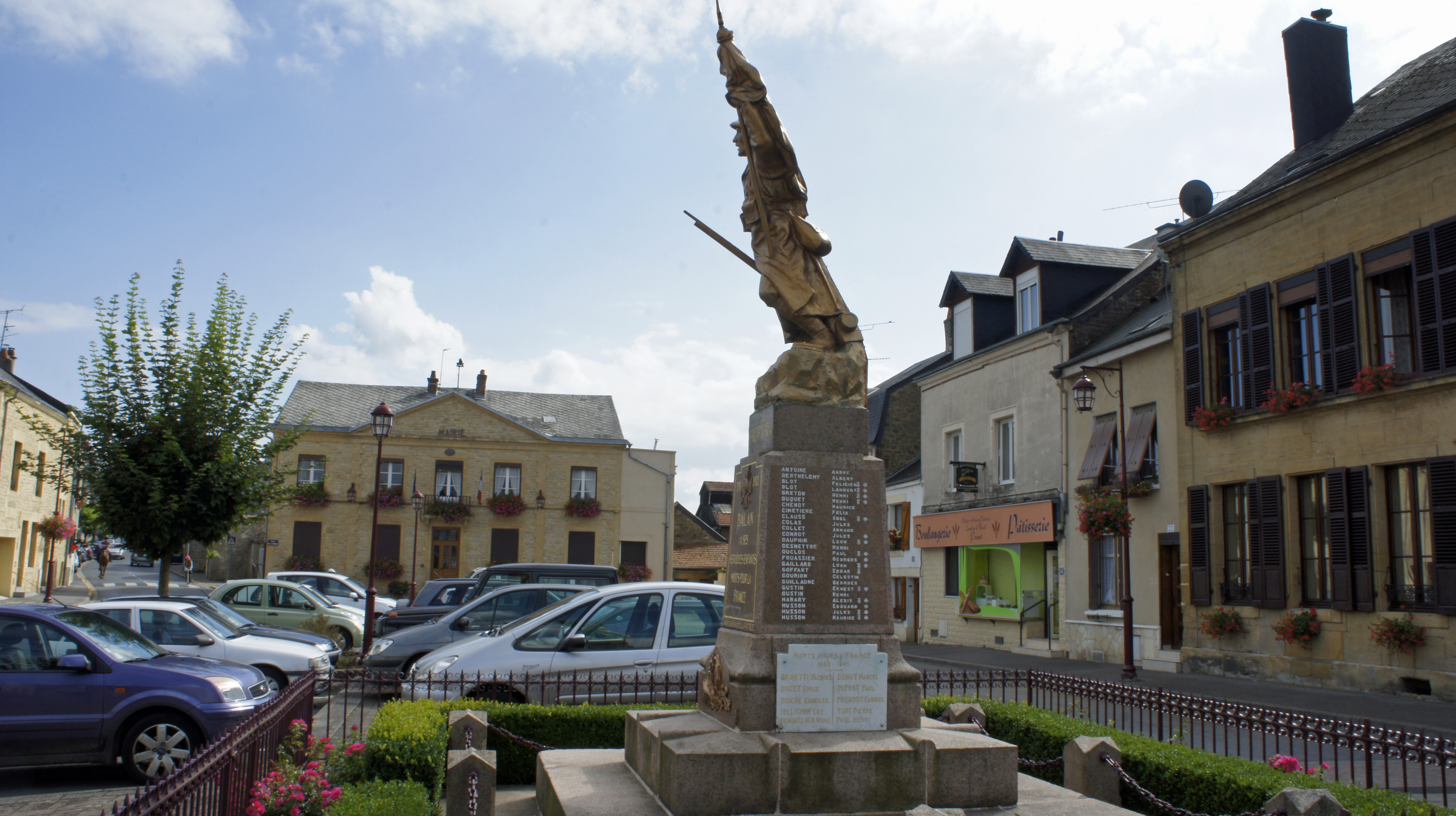 Vue de la Mairie qui habrite la Poste et du monument aux morts.